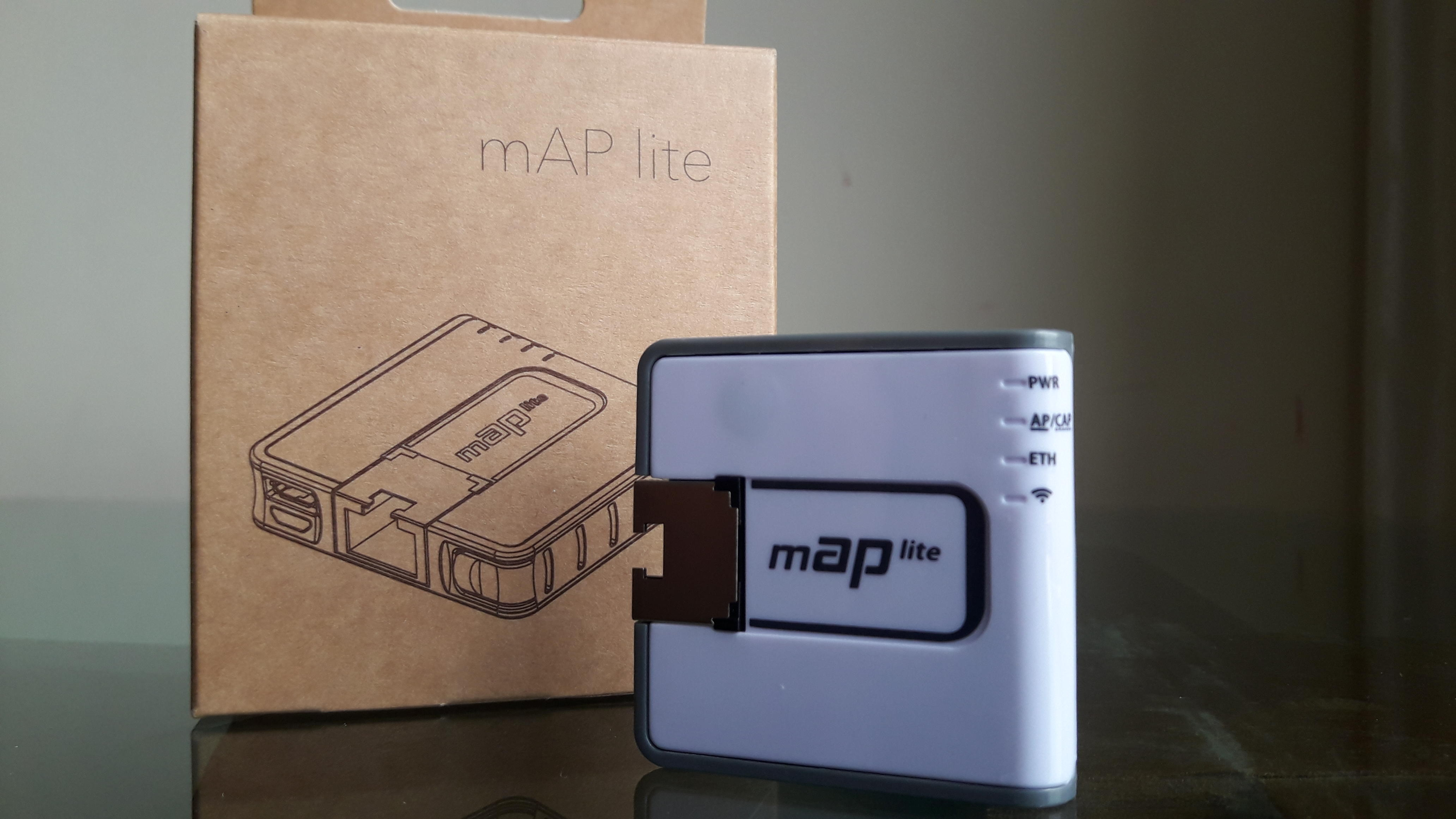 Router MikroTik RBmAPL-2nD